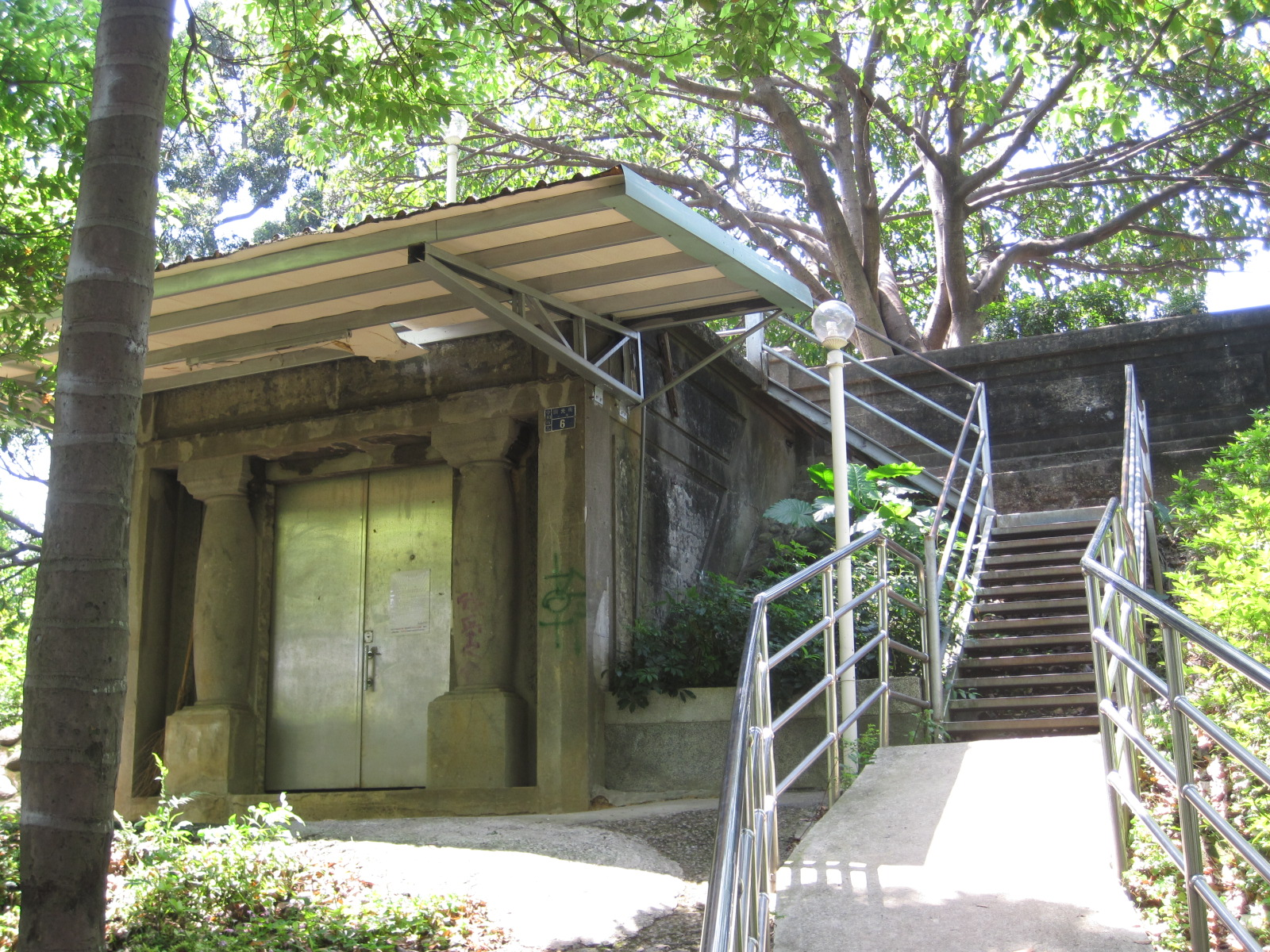 中和瑞穗配水池的入口。